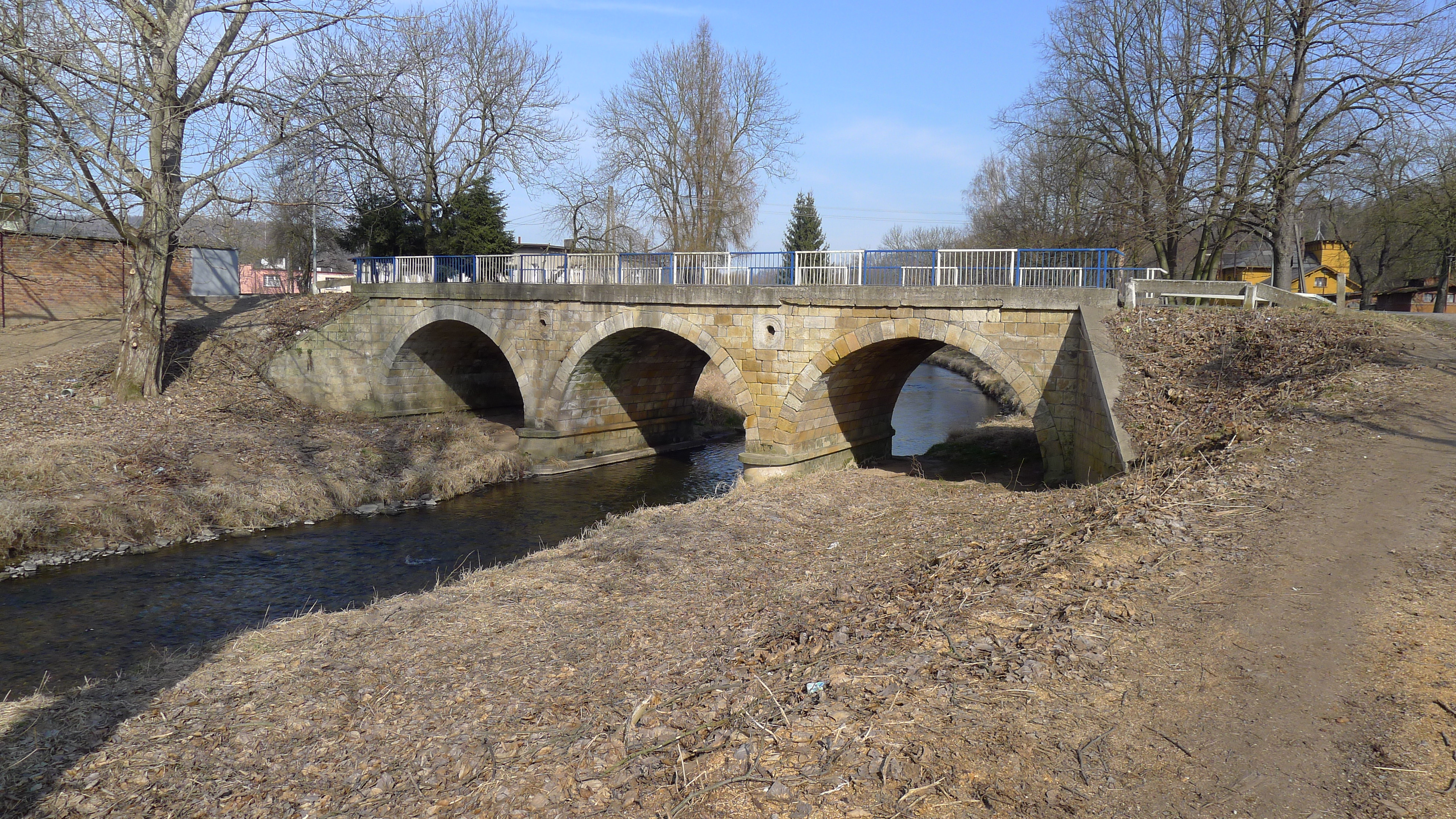 Jerzmanice-Zdrój - most na Kaczawie